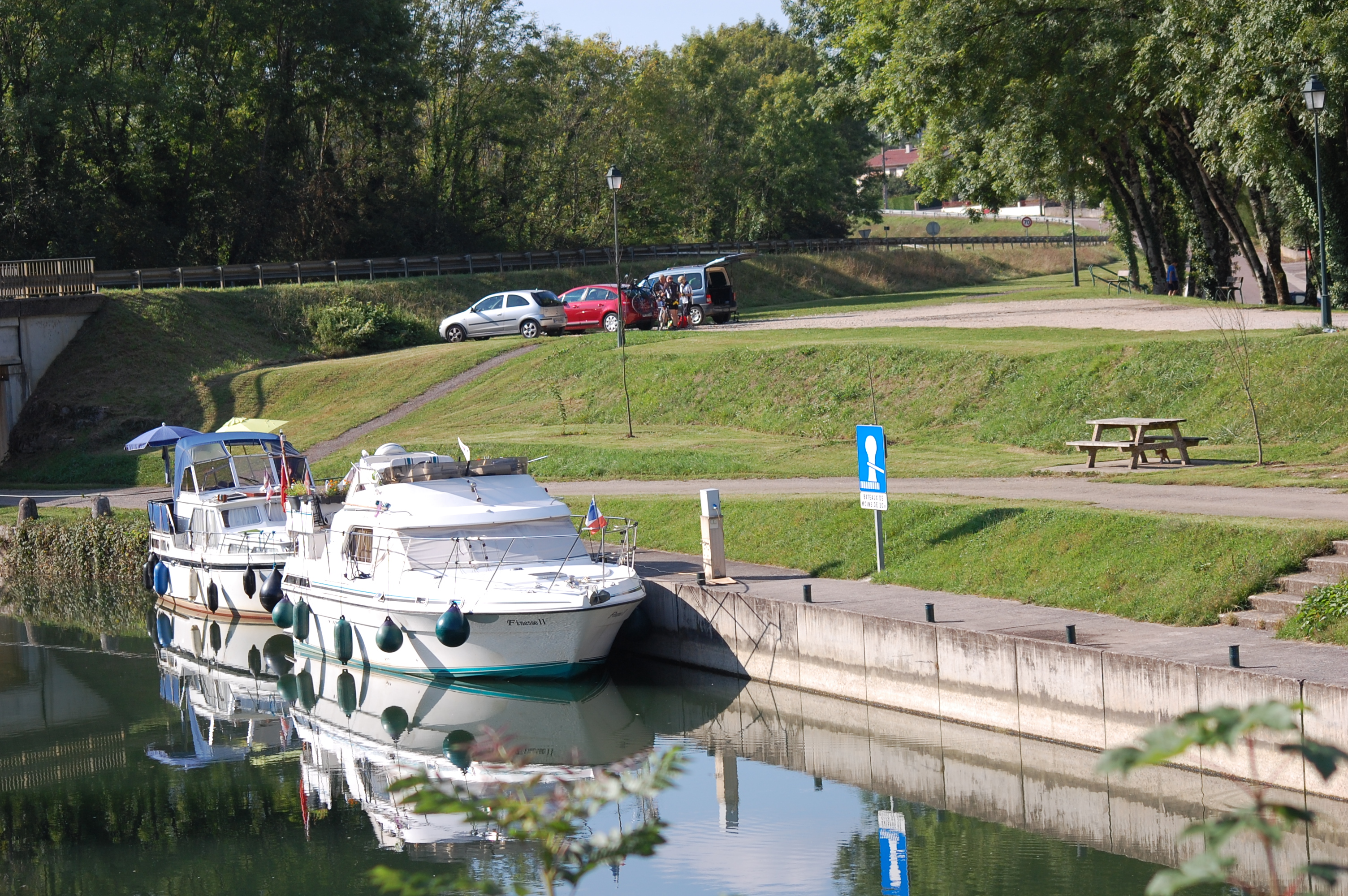 Appontement Fluvial de Ranchot